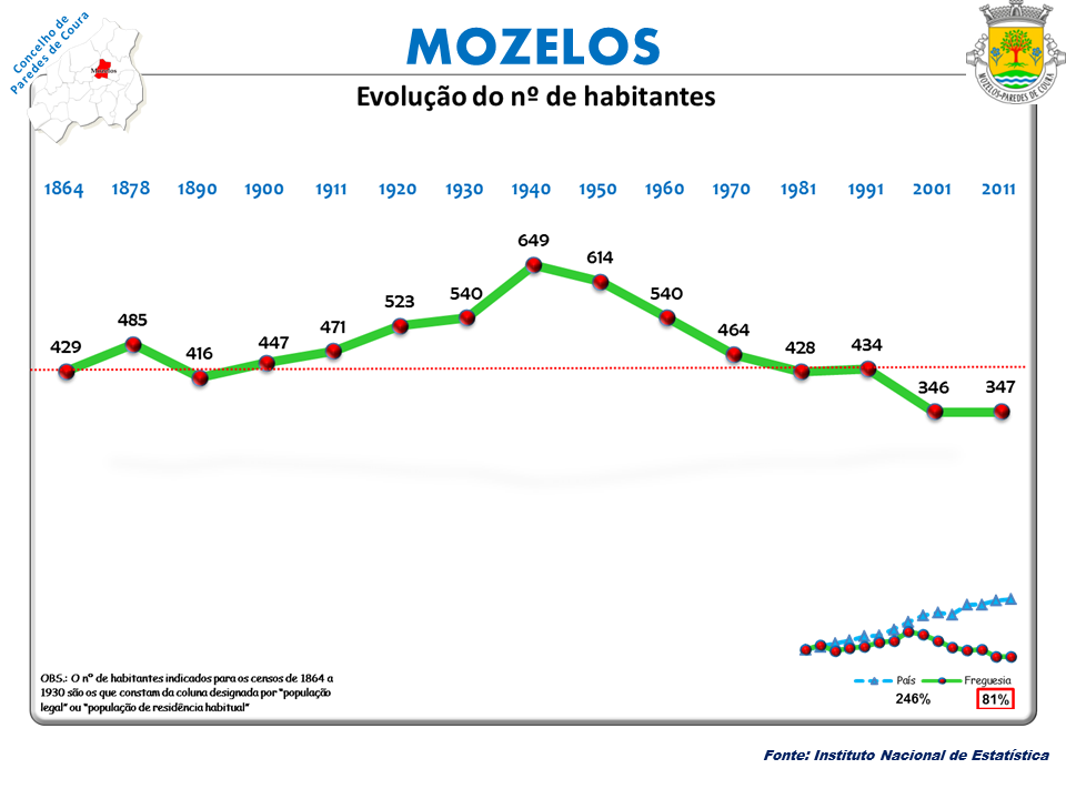 Censos 1864/2011